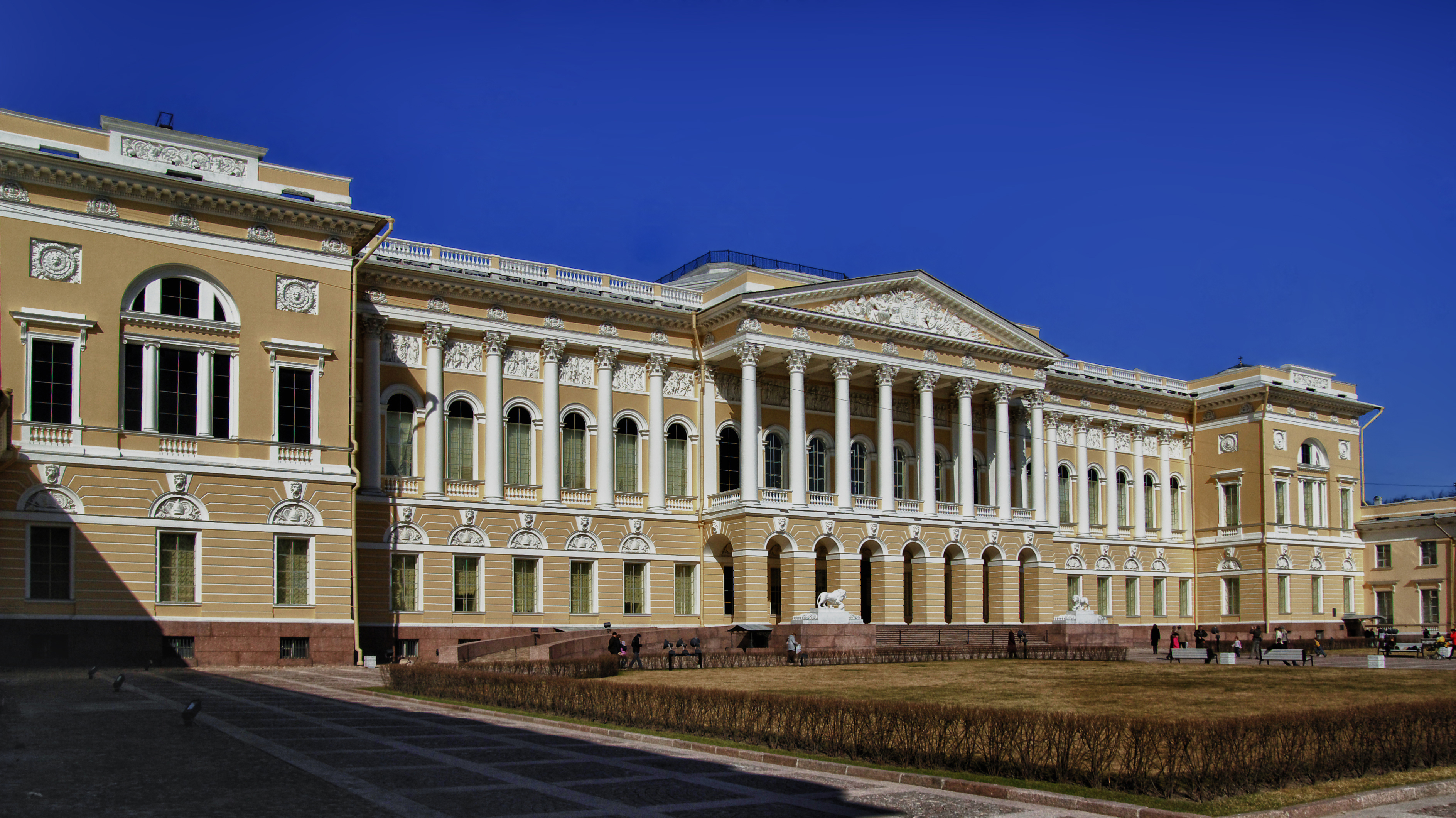 Русский Музей Russian Museum